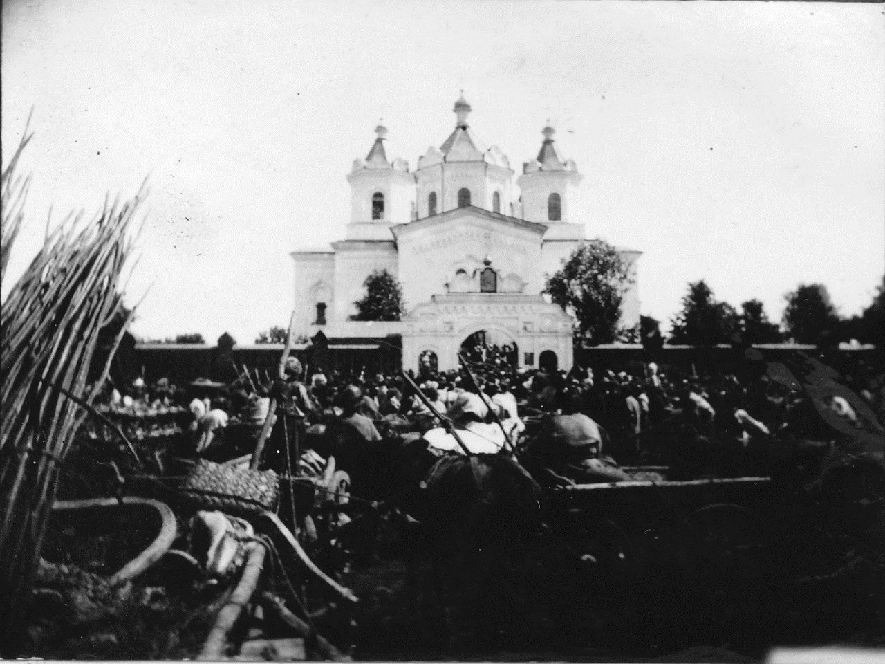 Беларуская (тарашкевіца): Хоцімск (Chocimsk), пляц Рынак (plac Rynak). Царква Сьвятой Тройцы